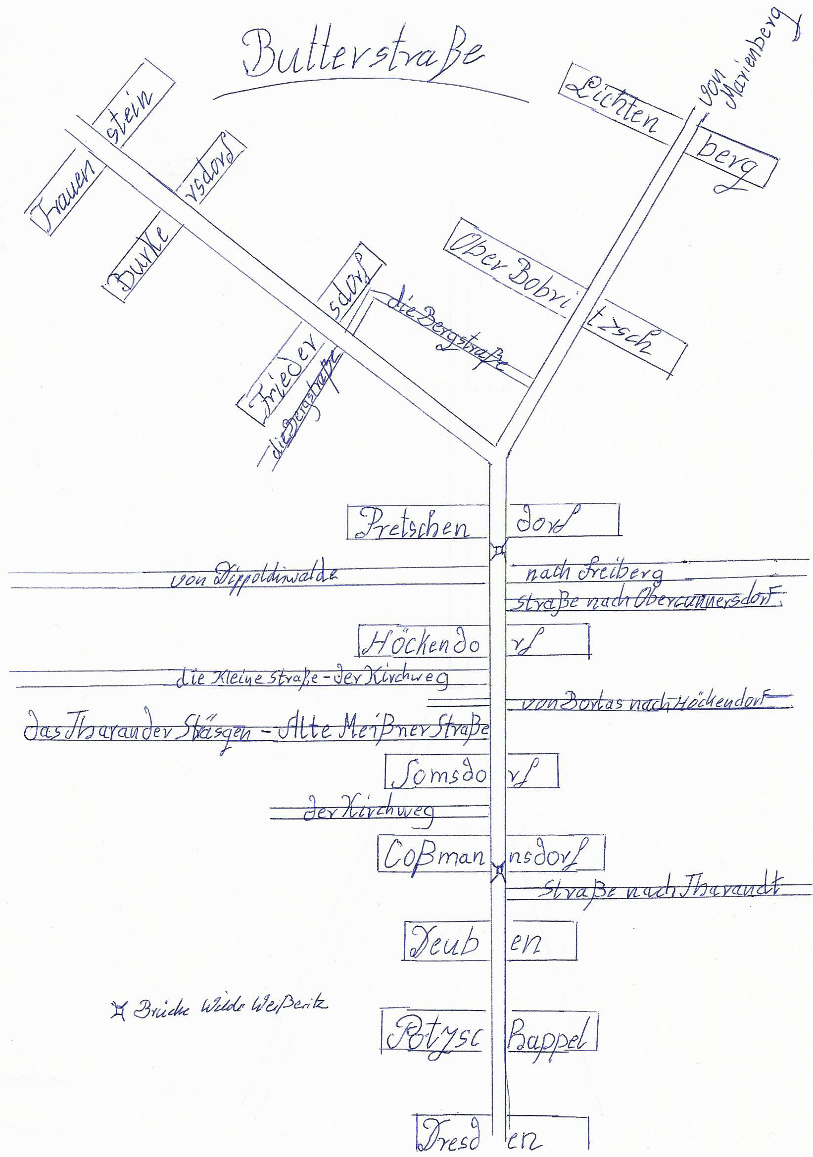 Skizze der Butterstraße